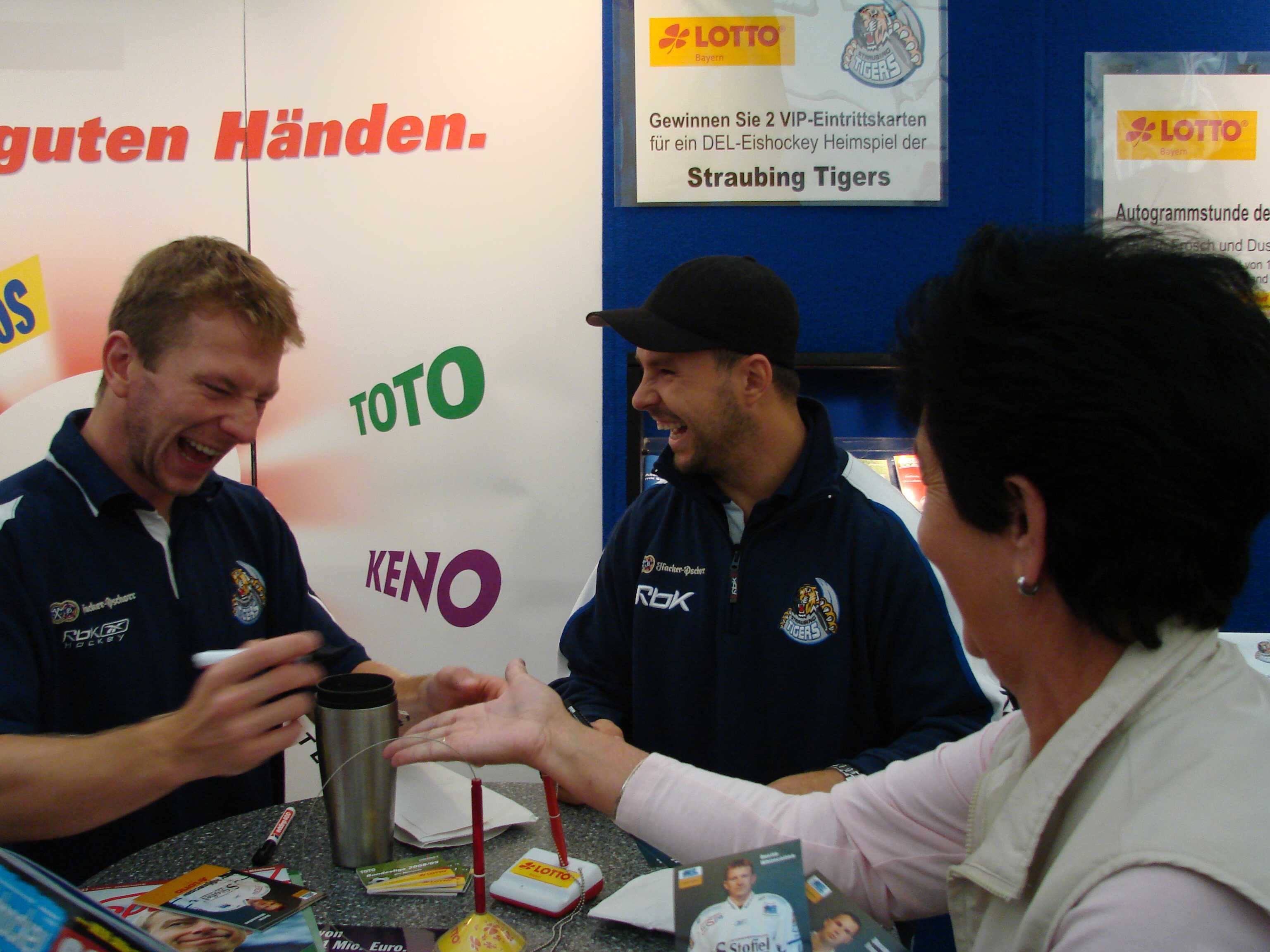 Dustin Whitecotton und Dusan Frosch bei Autogrammstunde in Straubing, den 16. Aug. 2008